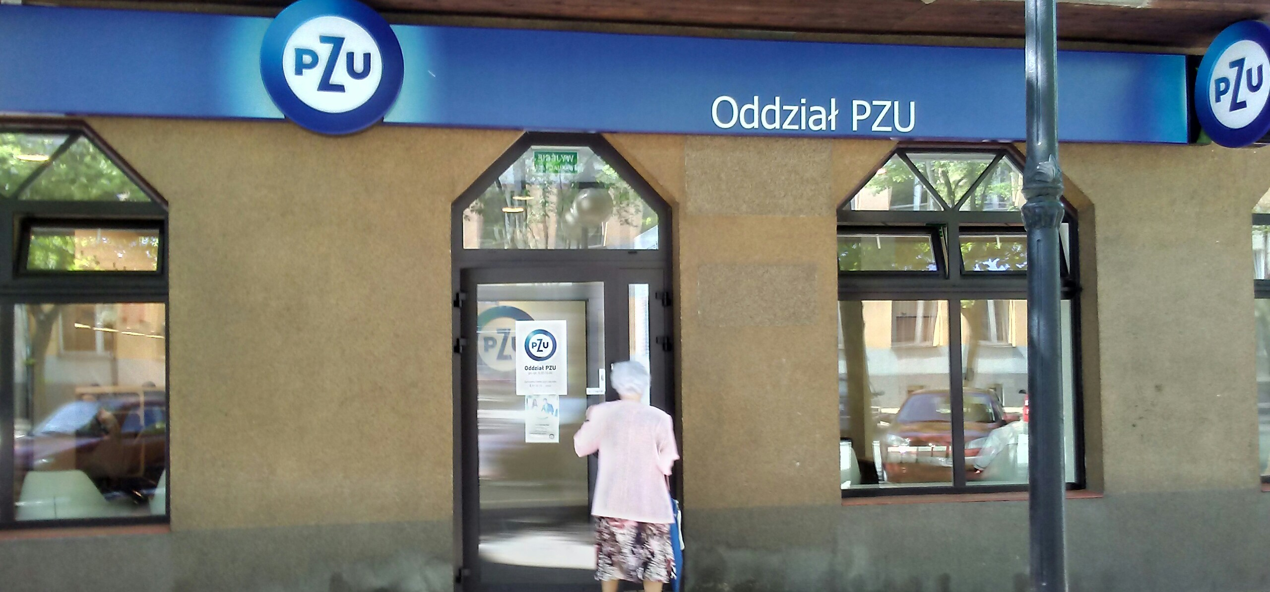 Oddział PZU w sześćdziesięcio tysiecznym Tomaszowie Mazowieckim w w województwie łódzkim